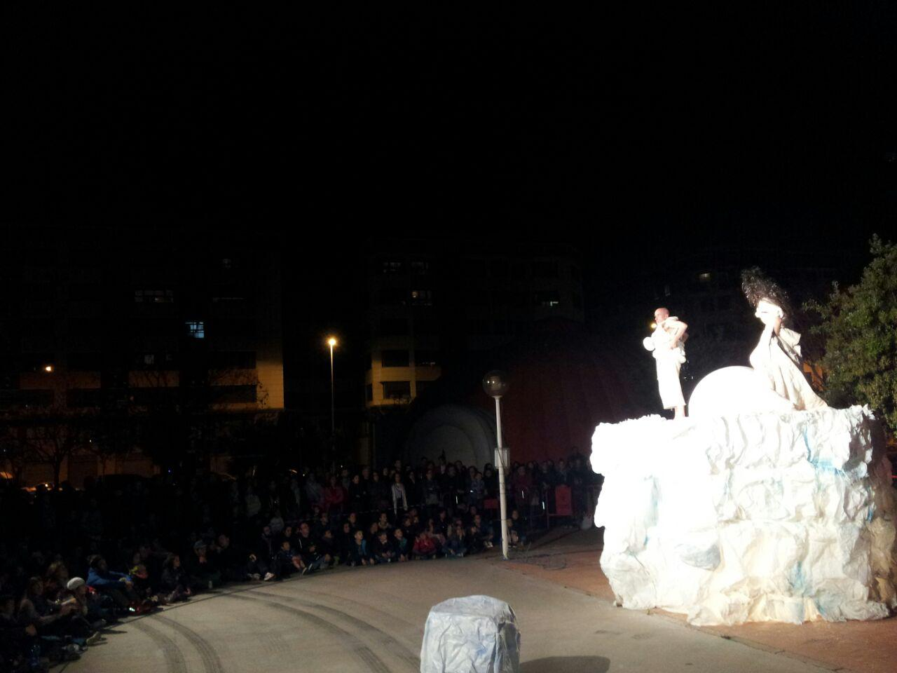 Festival Internacional de Teatro en la Calle This is a photography of a Folklore festival in Spain (Wikidata id Q23663335).